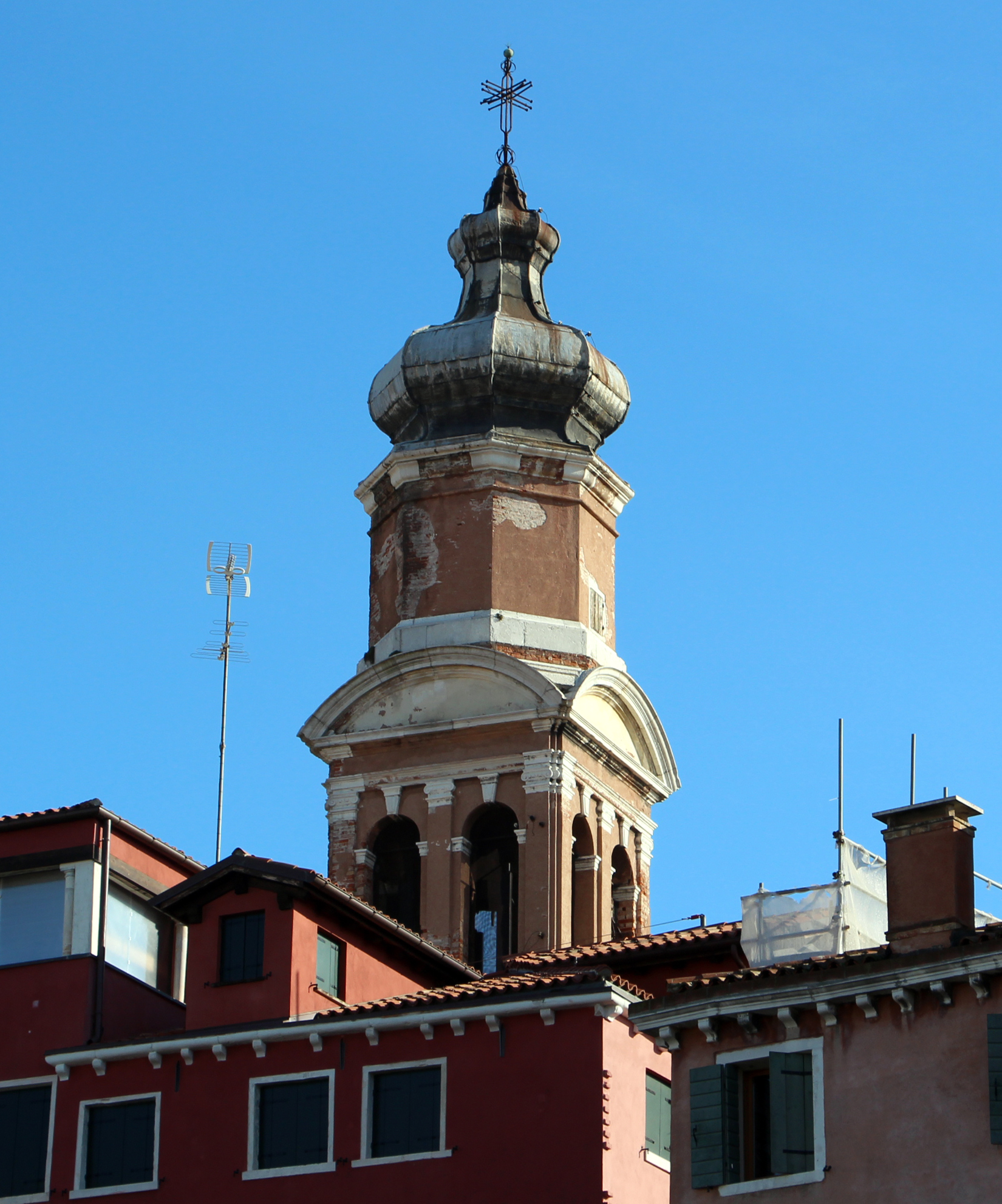 Venezia, canali e miscellanea , Tudy Sammartini, Daniele Resini, Die Türme von Venedig, p. 148, 149